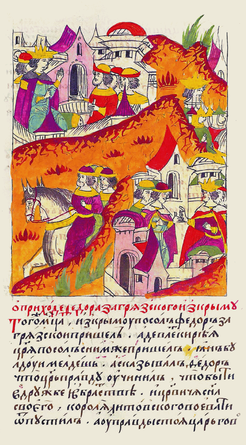 О приходе Федора Загряжского из Крыма. В том же месяце пришел из Крыма посол Федор Загряжский, а с ним же пришел посол царя Девлет-Гирея Янбулдуй Мелдеш. И сказал Федор, что царь клятву дал в том, чтобы быть в дружбе и в братстве, и своего сына царевича отпустил воевать против короля Литовского, а в своей клятве царь гово- [рил о том, чтобы прислать великому князю казну...]